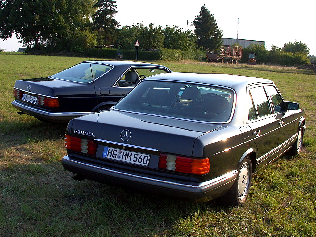 Mercedes-Benz W126: 500 SEC and 560 SEL